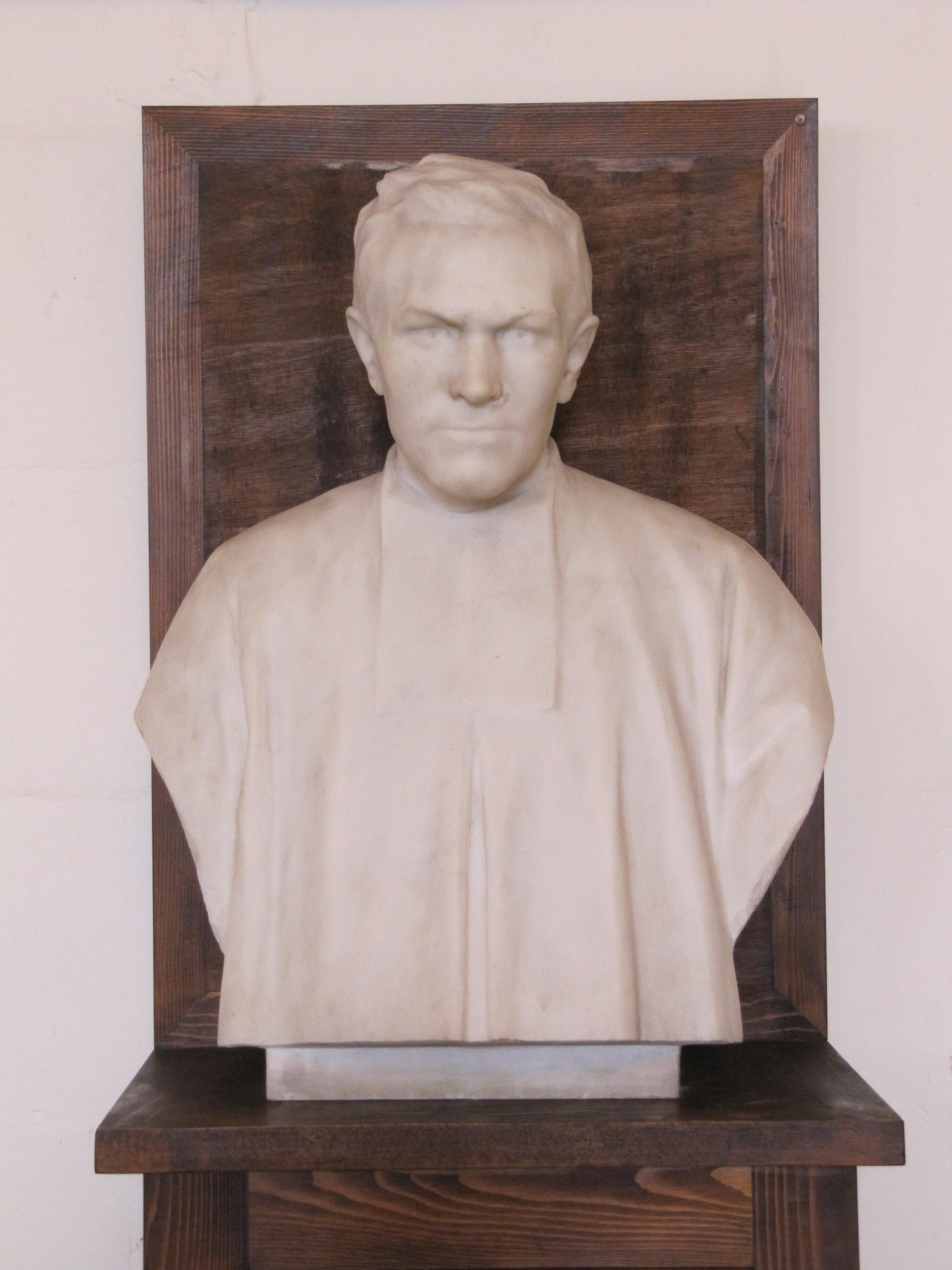 Бюст блаженного Антуана Шевриера